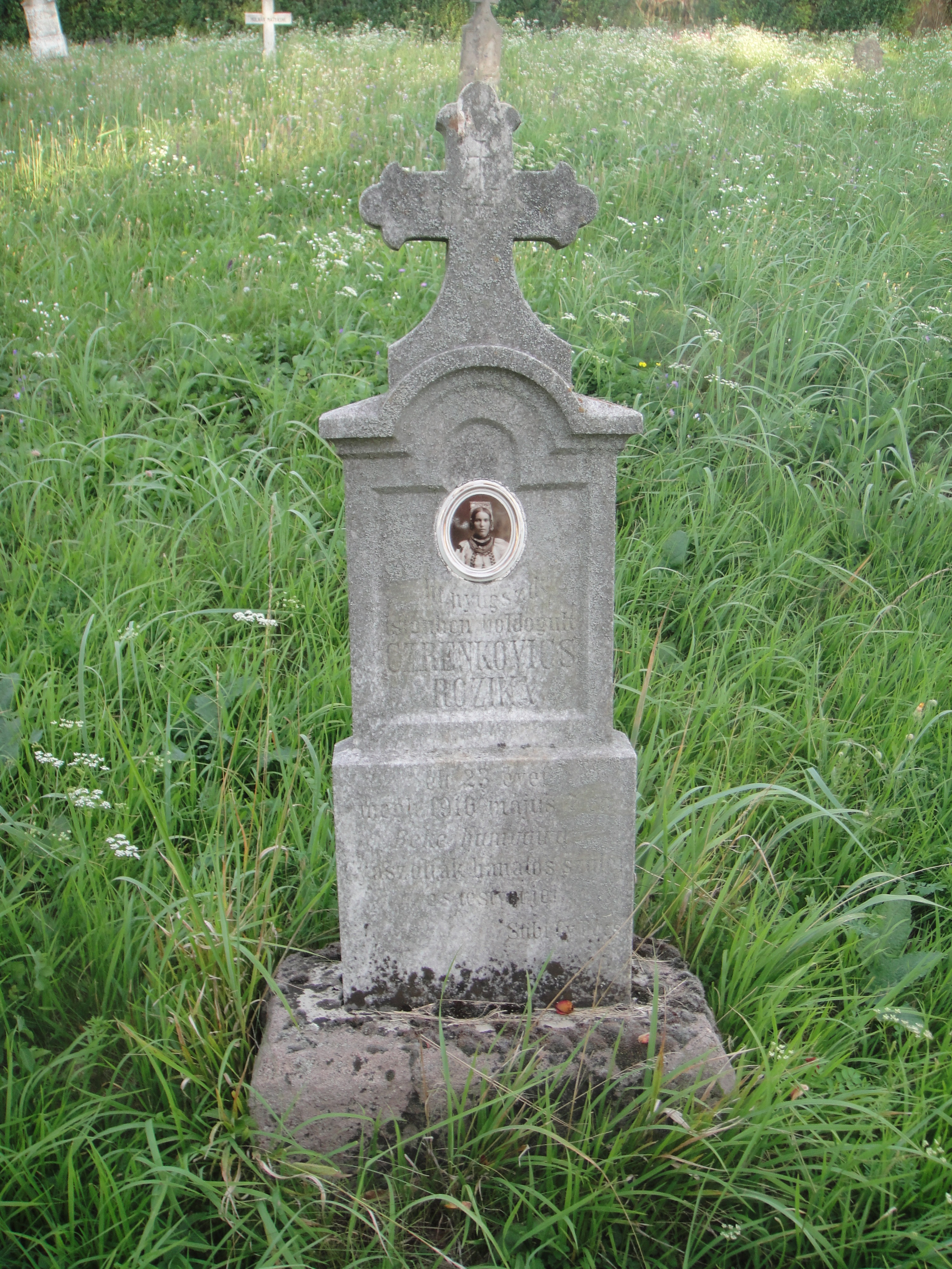 Szőkében található temetőben lévő bosnyák sír